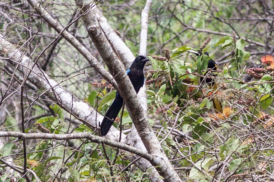 Barranca El Chonco, Jalisco